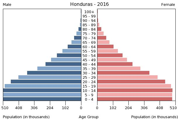 A population pyramid illustrates the age and sex structure of a country's population and may provide insights about political and social stability, as well as economic development. The population is distributed along the horizontal axis, with males shown on the left and females on the right. The male and female populations are broken down into 5-year age groups represented as horizontal bars along the vertical axis, with the youngest age groups at the bottom and the oldest at the top. The shape of the population pyramid gradually evolves over time based on fertility, mortality, and international migration trends.